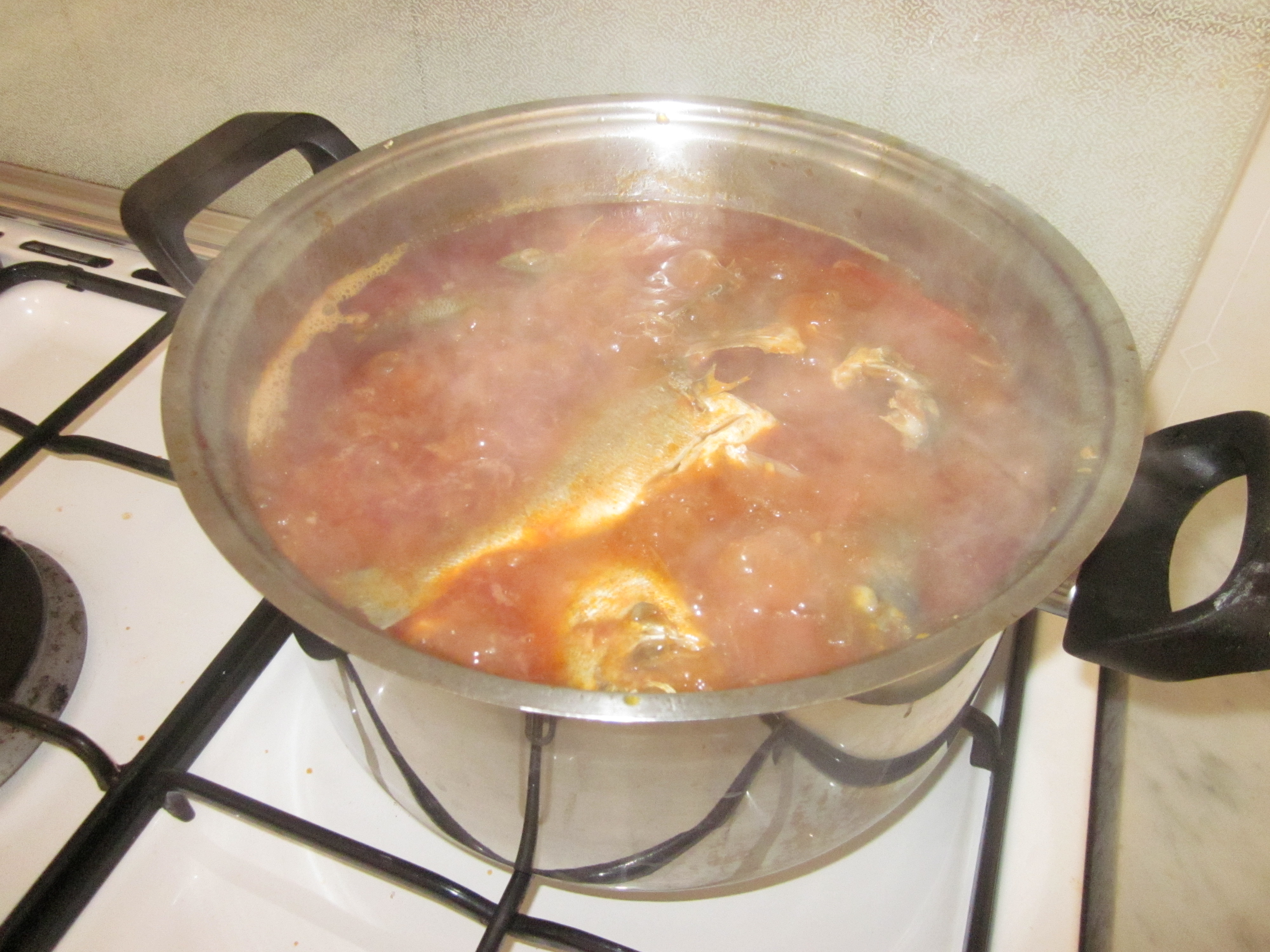 مرقة صفاقسية في مراحلها الأخيرة بعد أن يتم مرقها.